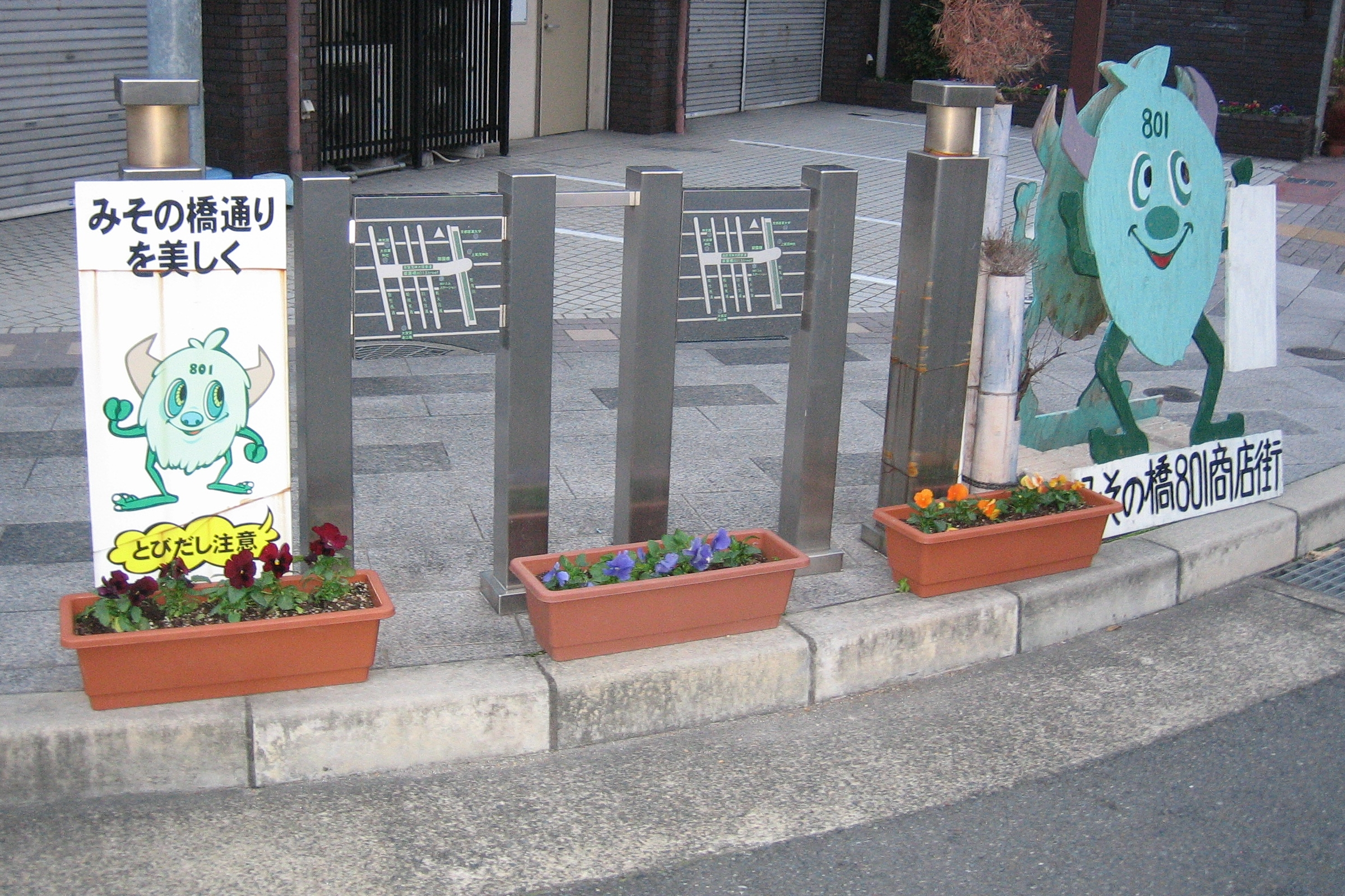 御薗橋通交差点案内プレートを撮影